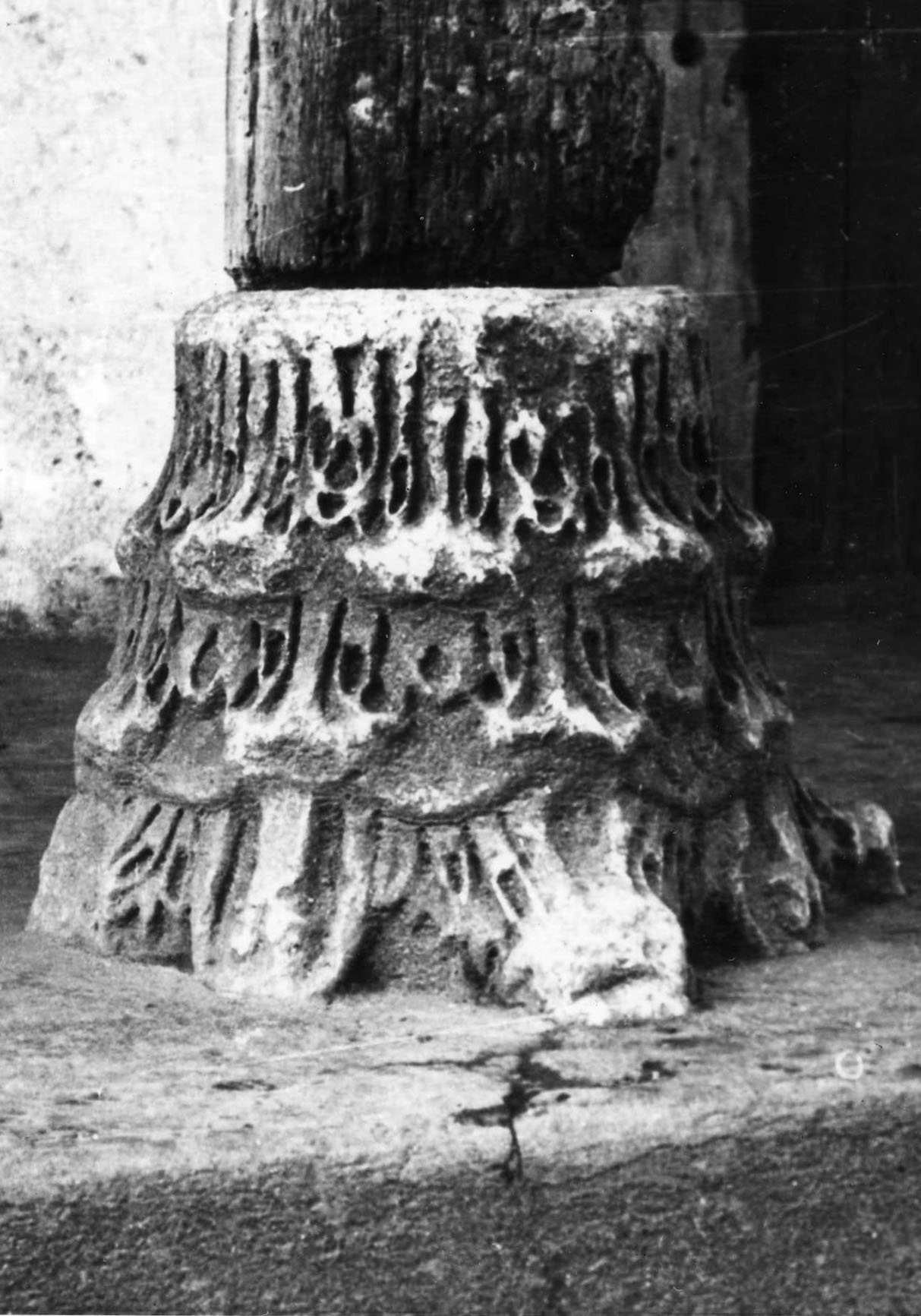 Ce chapiteau sert de base à un pilier de la métairie du château. Il est en marbre blanc de St-Béat et peut provenir de la villa romaine de Sana. Actuellement il est en partie ennoyé dans le béton !